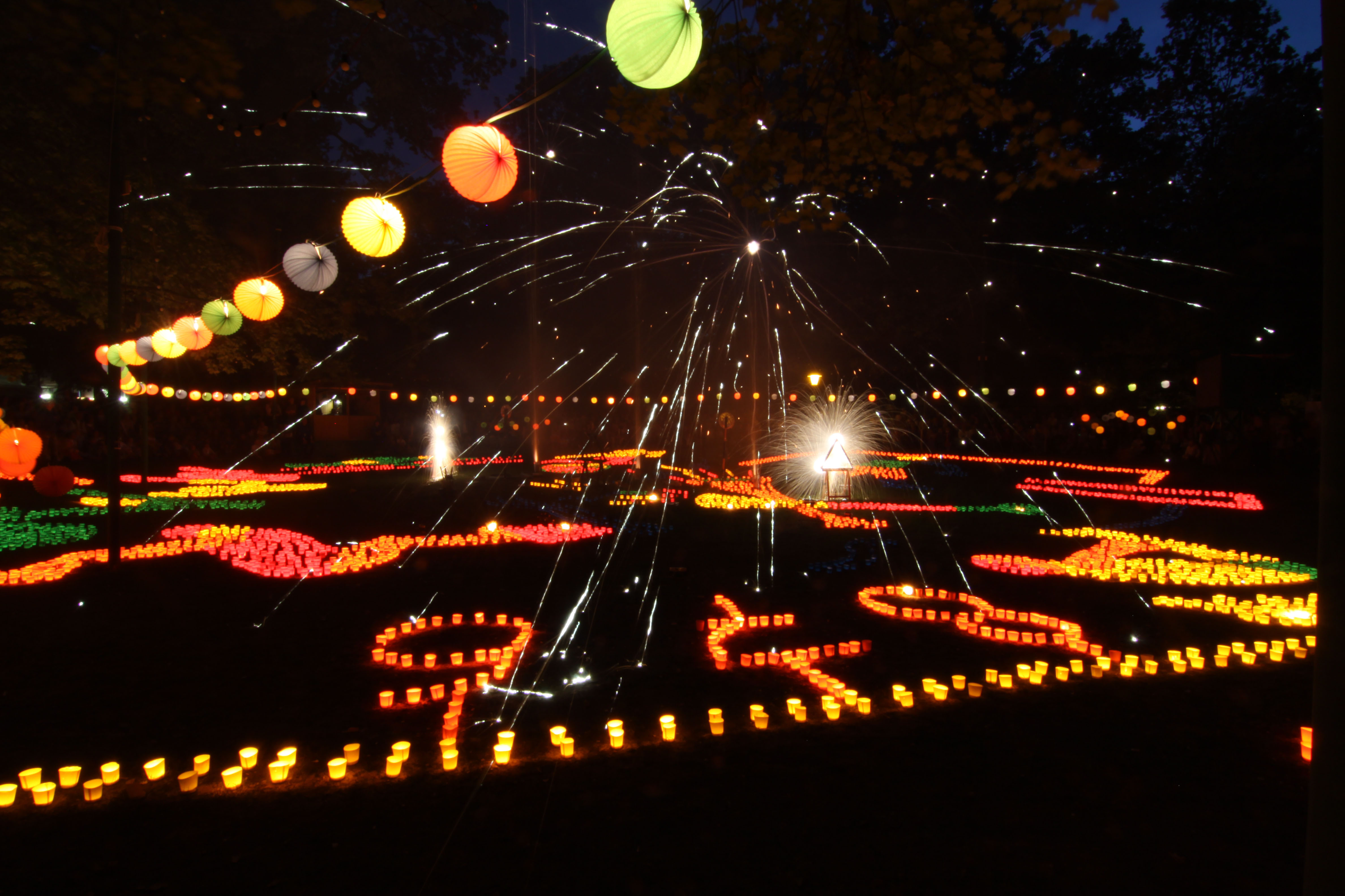 Allgäuer Festwoche Kempten